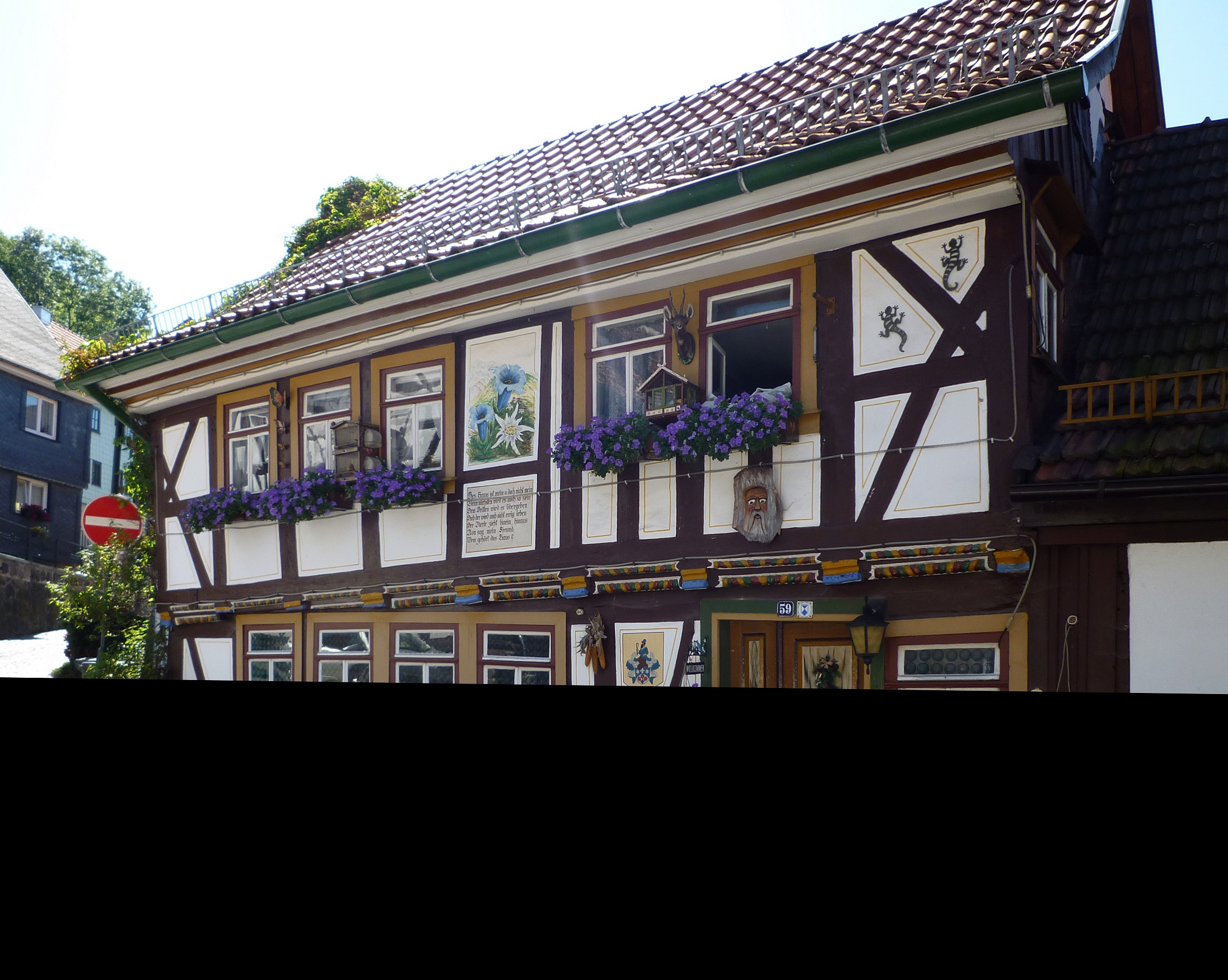 privates Wohnhaus mit Fachwerk am Ende der Köhlergasse in Ruhla